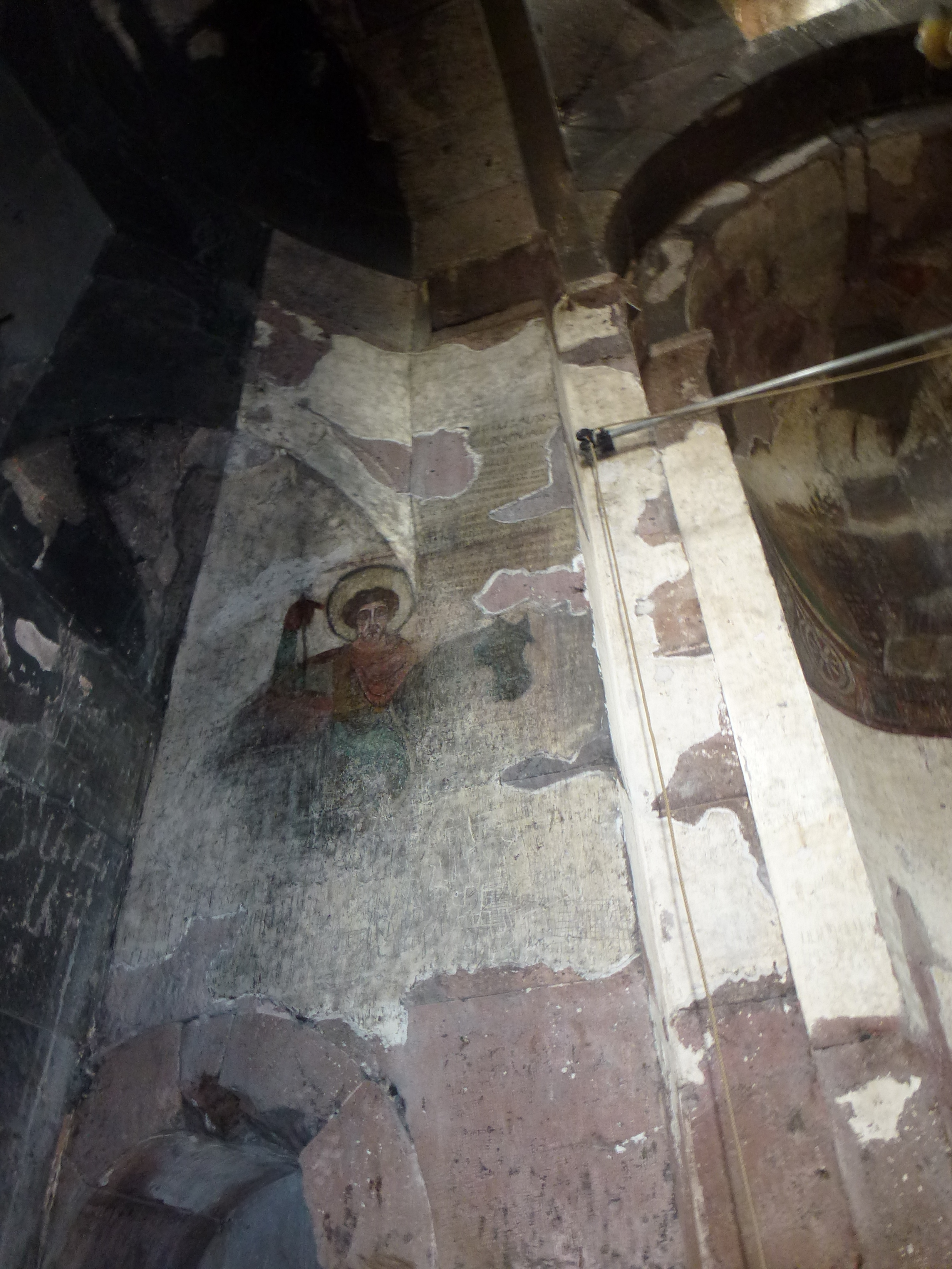 Լմբատավանք, Արթիկ, Հայաստան 2/5.1